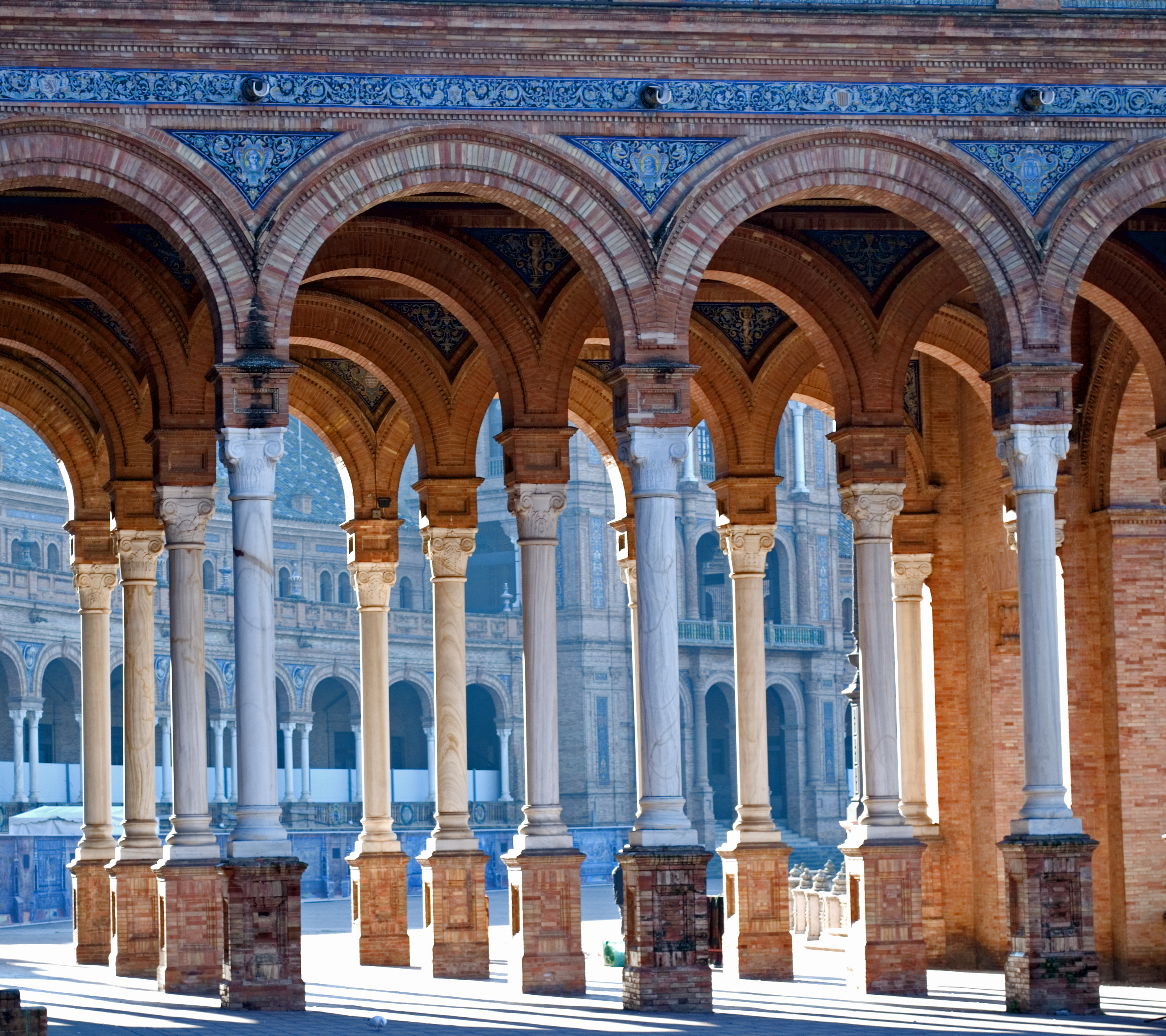 Plaza de España (Detalle arcada central)